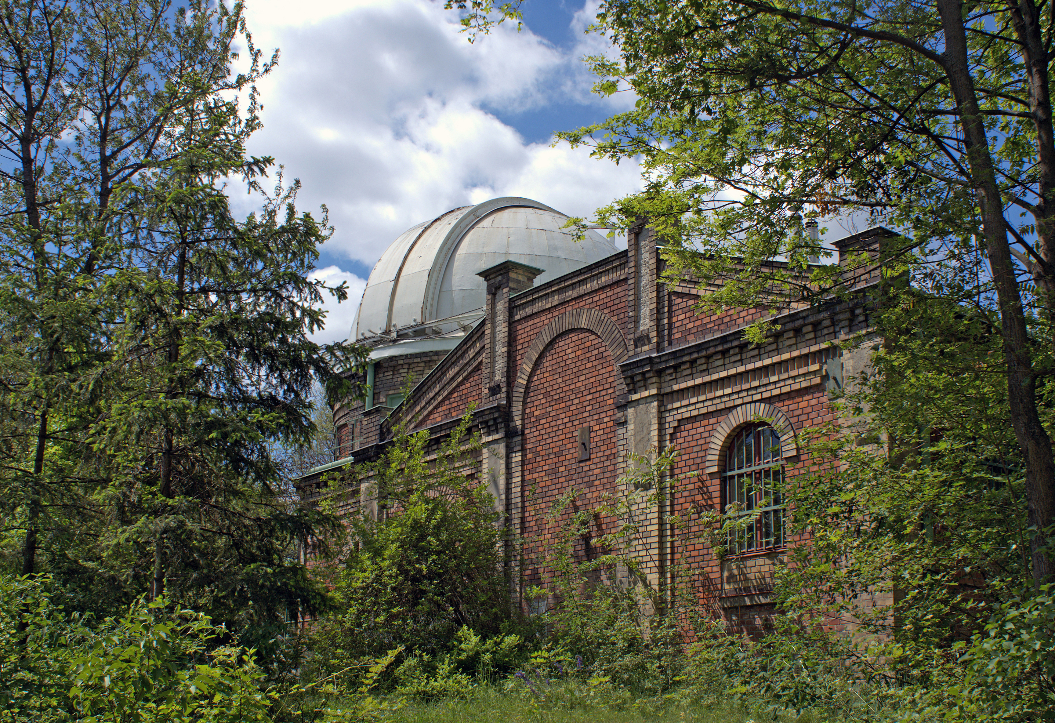 Sternwarteareal This media shows the natural monument in Vienna with the ID 713.